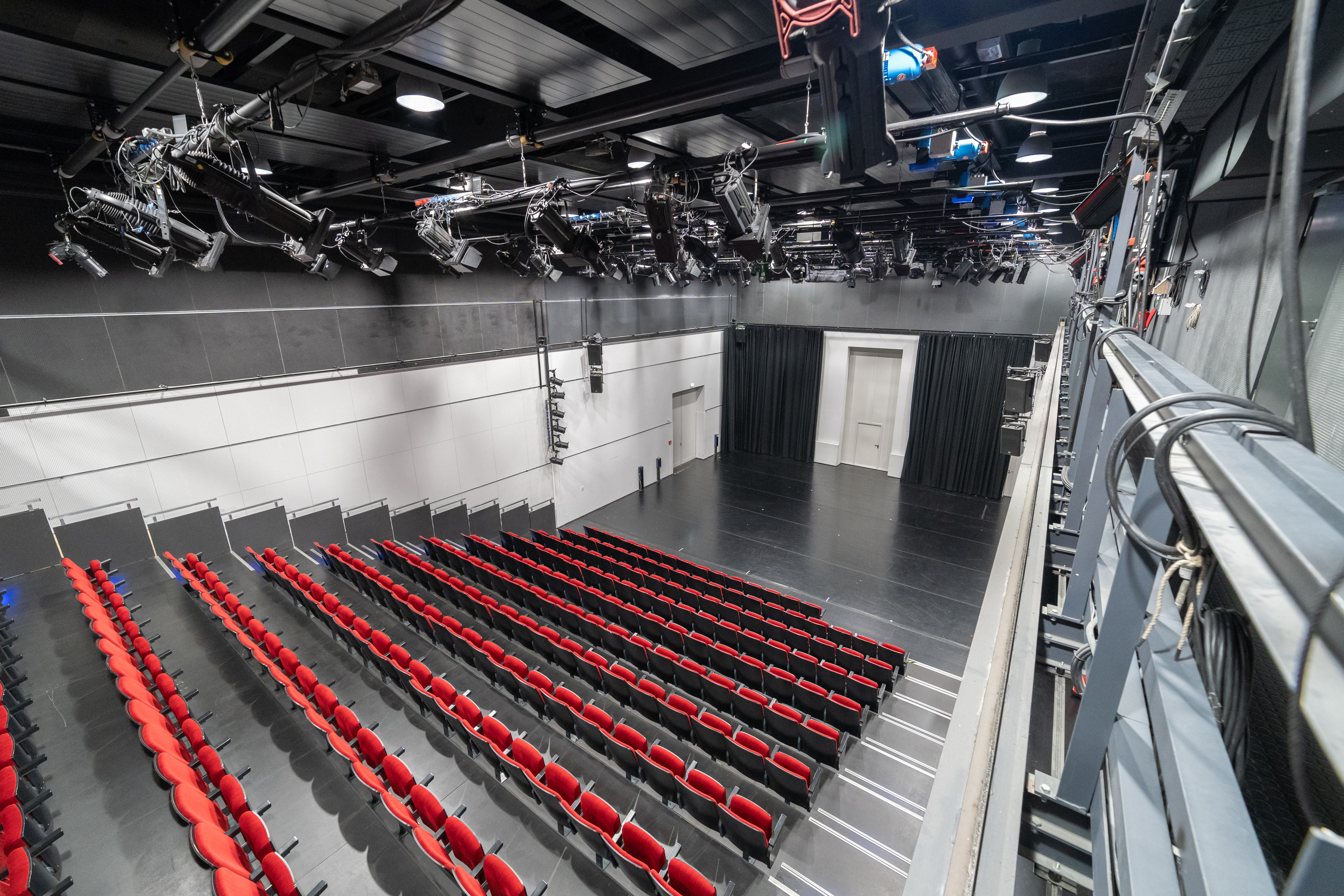 Sicht vom Catwalk aus auf die Bühne, Sitzreihen und Lichttechnik.